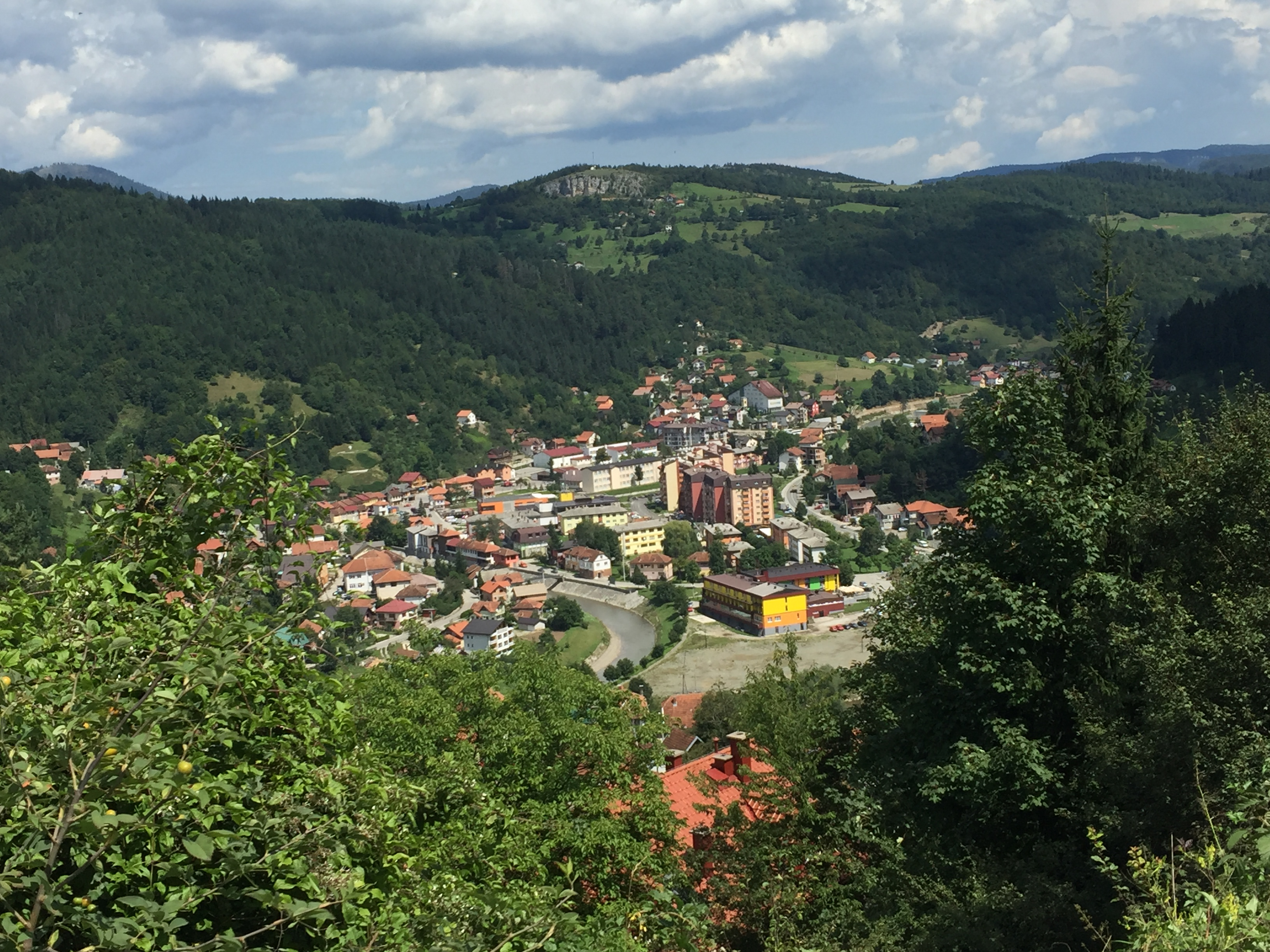 Pogled na Olovo 2016. godine